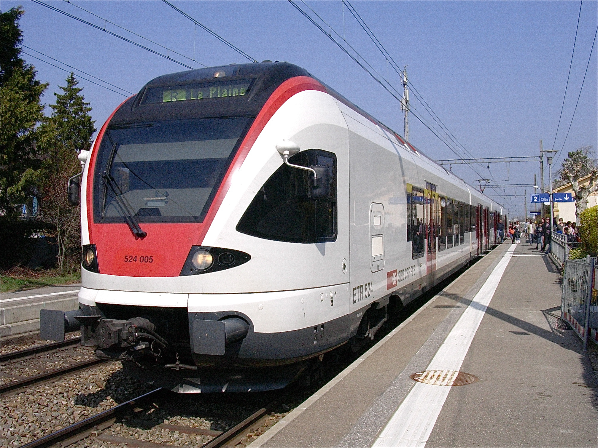 L'ETR 524-005 de type FLIRT des CFF en gare de Satigny et en direction de La Plaine